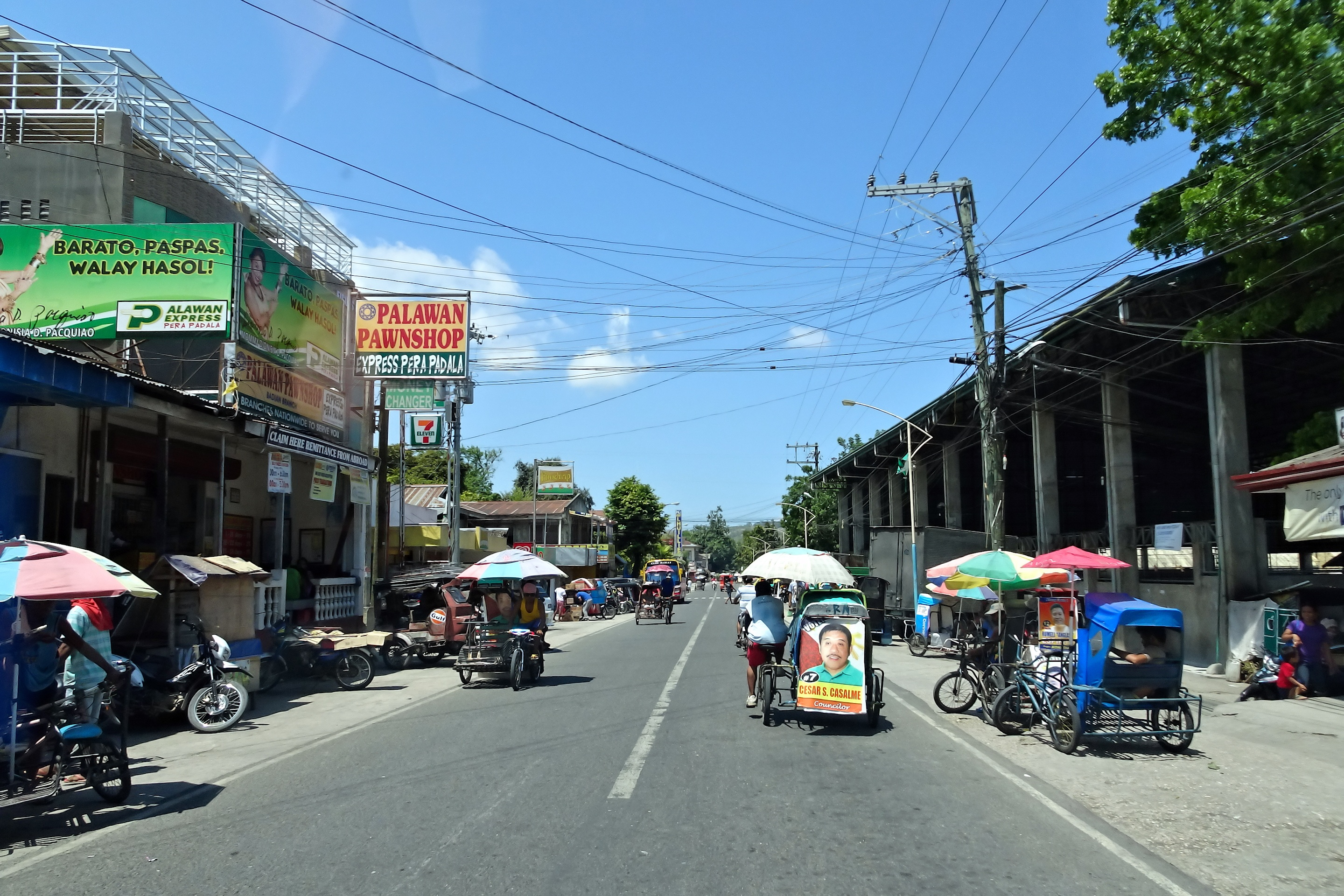 Badian, Cebu, Philippines